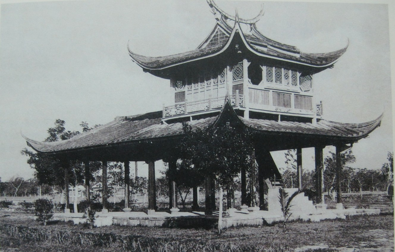 臺中湧泉閣